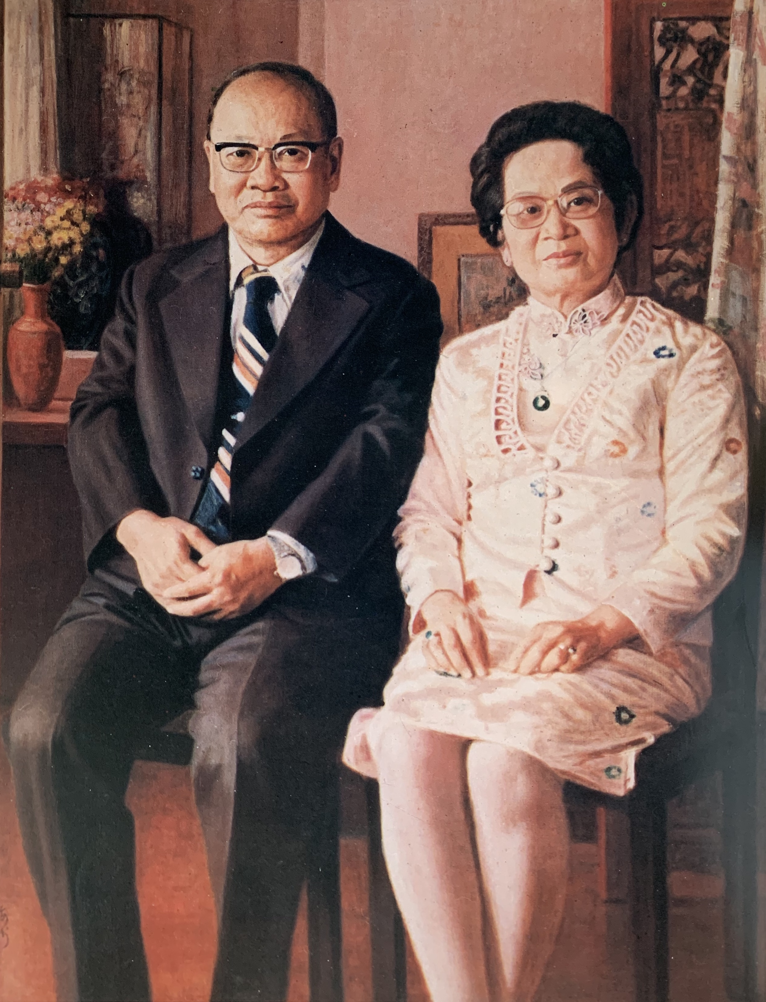 中文（台灣）: 李梅樹，1980，許鴻源博士伉儷；油彩，畫布，128 x 104 公分。 圖中繪製人物為順天堂中藥廠主人許鴻源博士與其夫人，該畫完成後由許博士典藏於美國。